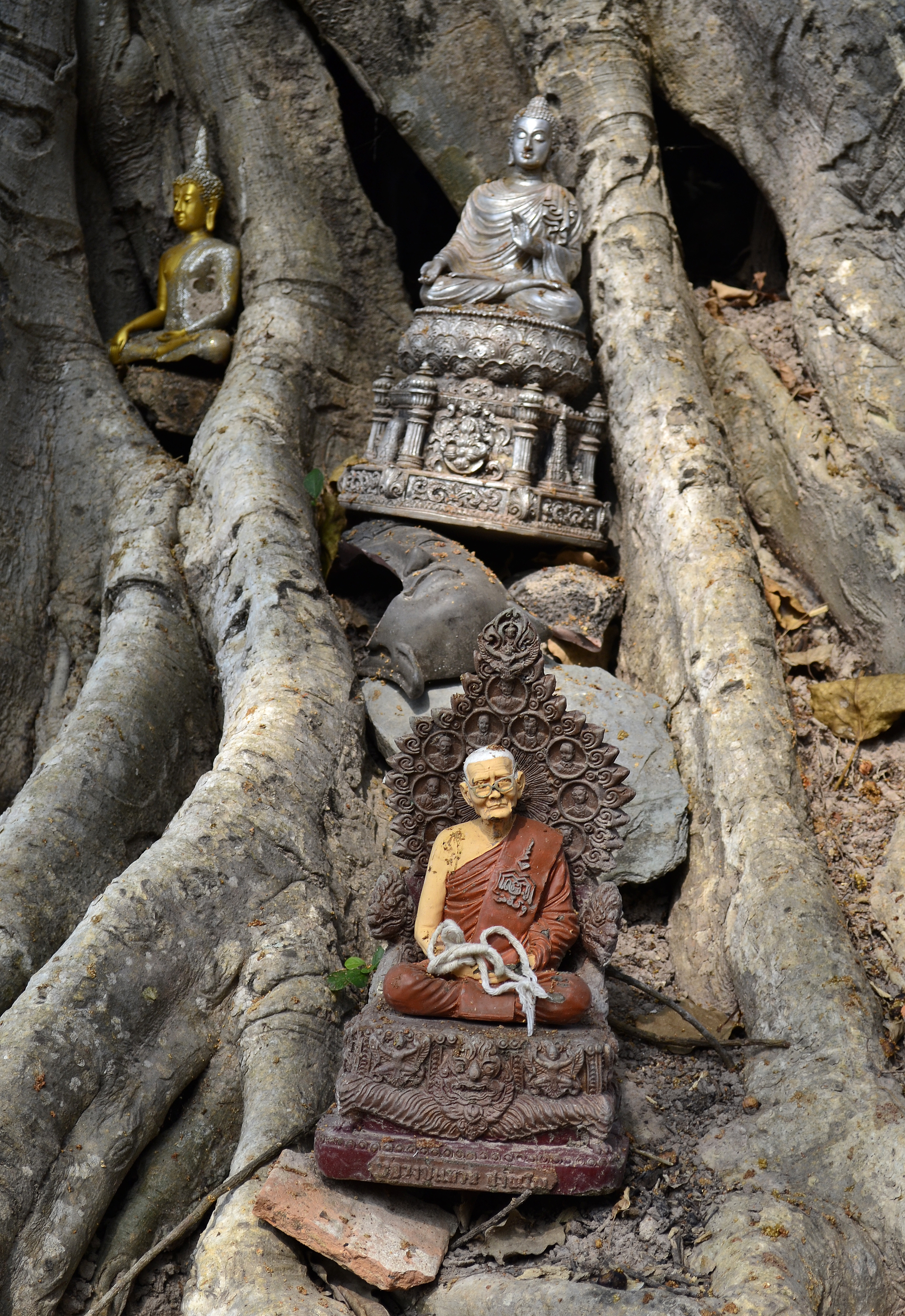 Wat Sri Sawai im Geschichtspark Sukhothai